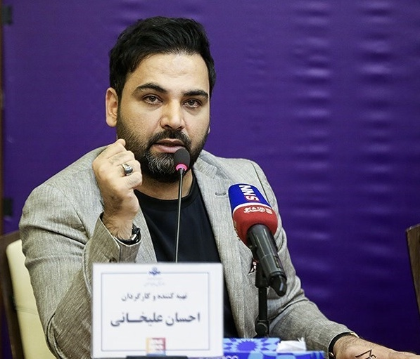 احسان علیخانی در نشست خبری عصر جدید